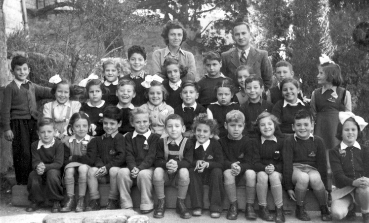 עמנואל יפה וחיה שטקלברג עם תלמידיהם; 1944 - ביהס הריאלי